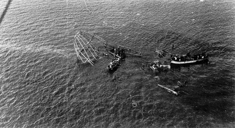 Bjærgningen af L 10